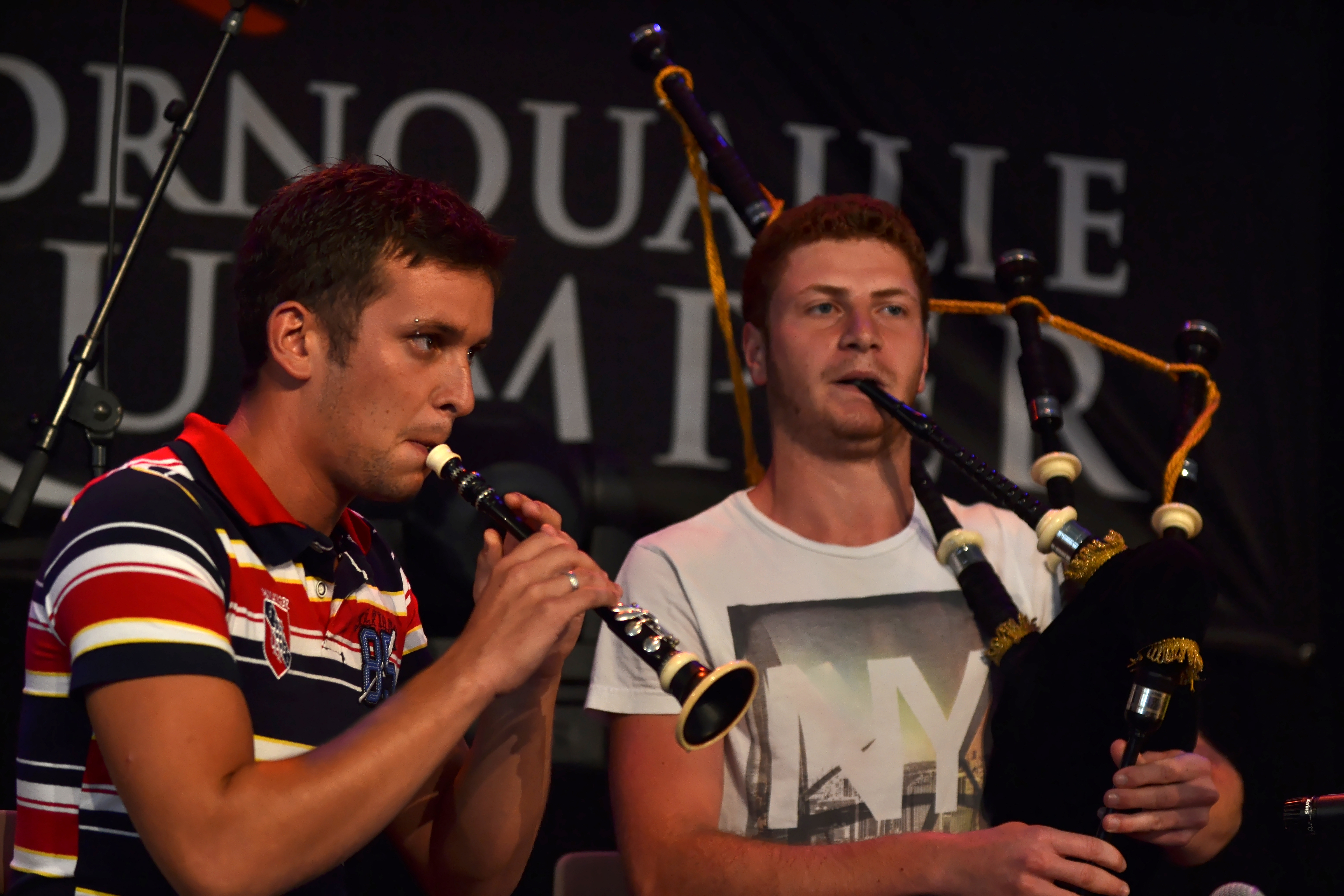 Couple Braz Le Grand / De Jacquelot participant au Trophée de la Plume de Paon le samedi 27 juillet 2013 à l'espace Saint-Corentin lors du festival de Cornouaille.